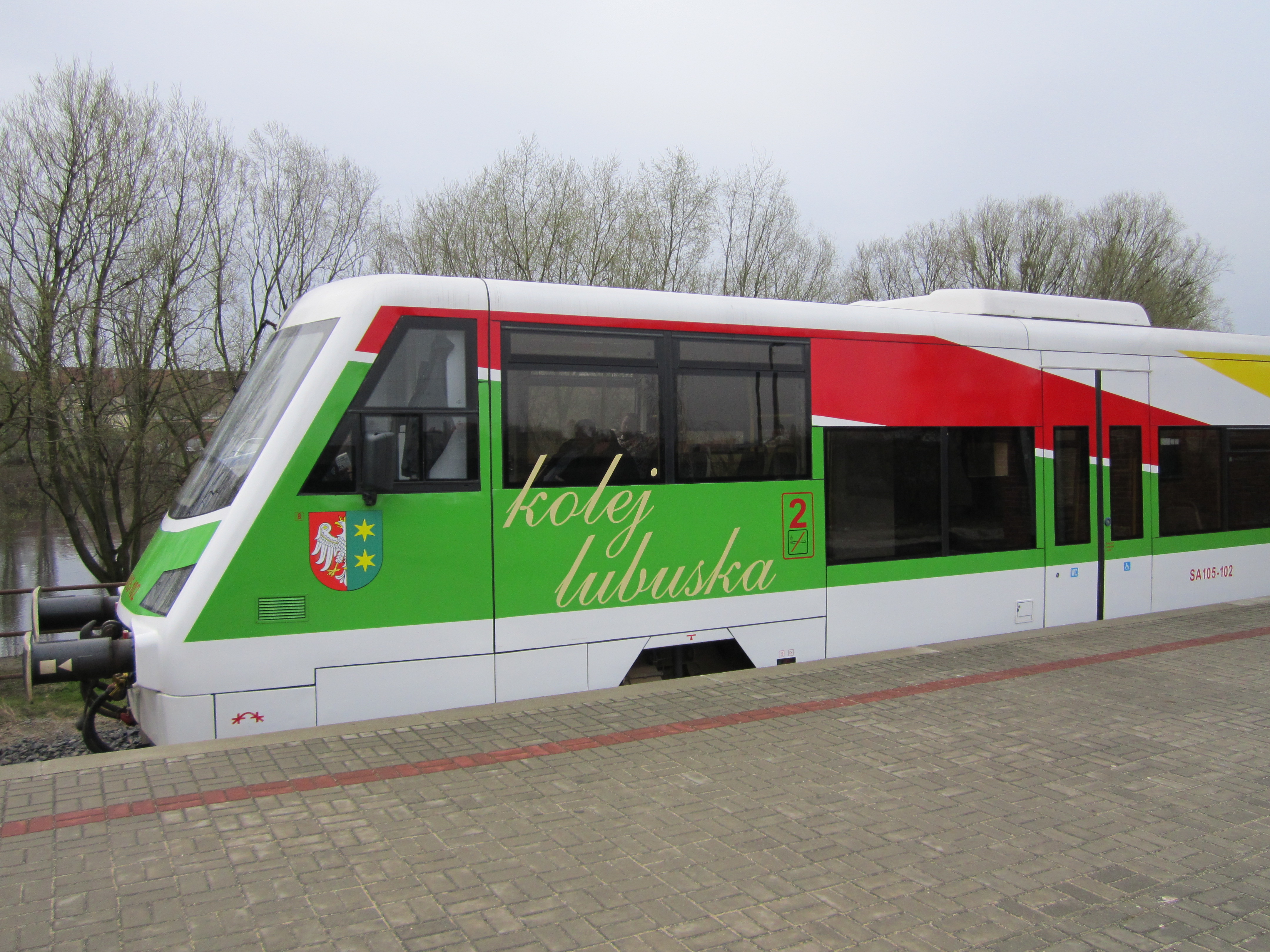 SA 105-102 w Gorzowie Wlkp. peron 4 relacja Gorzów-Zbąszynek